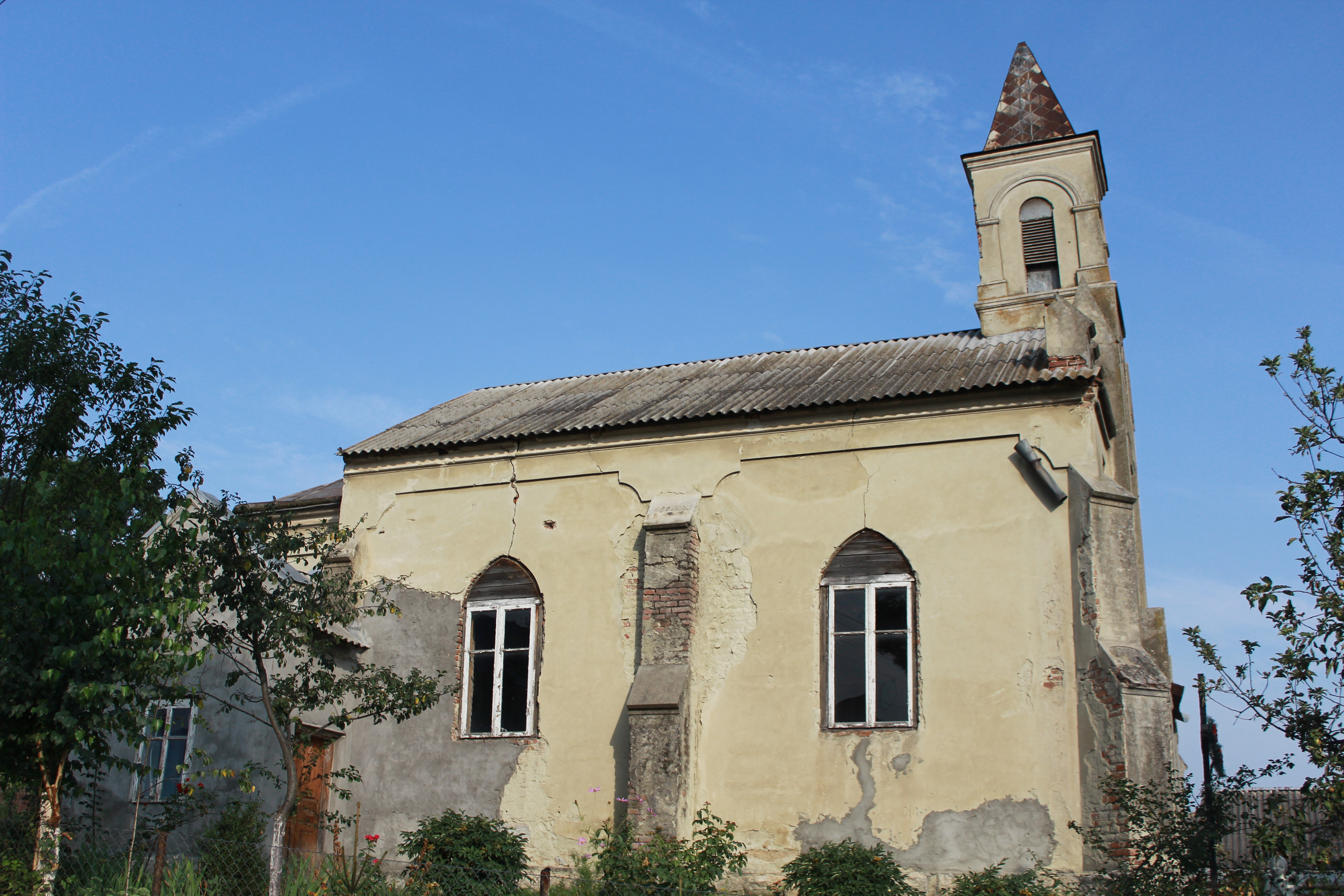 Костел, с. Пищатинці, Борщівський район, Тернопільська область